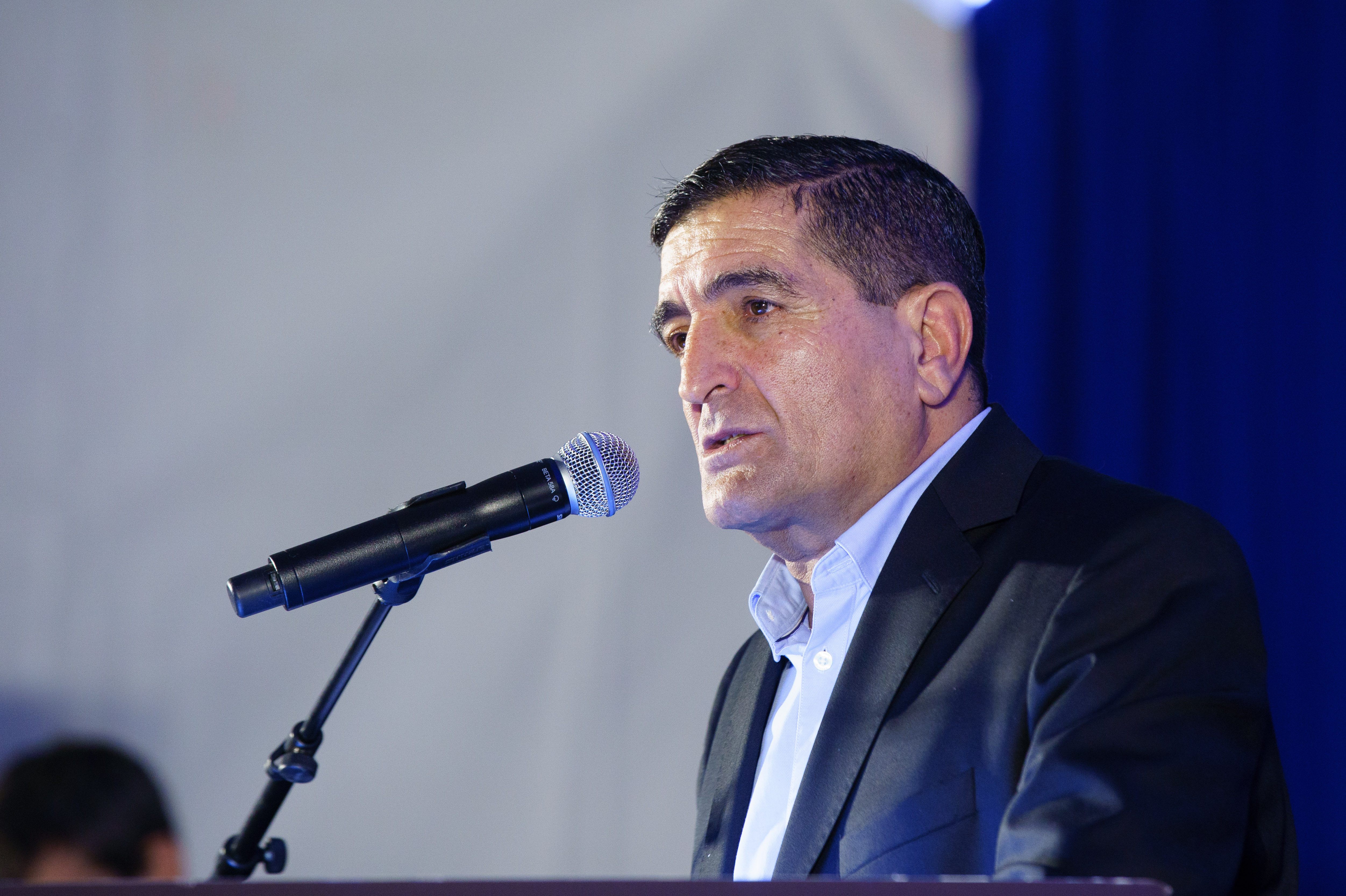 ניסים פרץ מציג את תוכנית החומש של חברת נתיבי ישראל, ינואר 2019